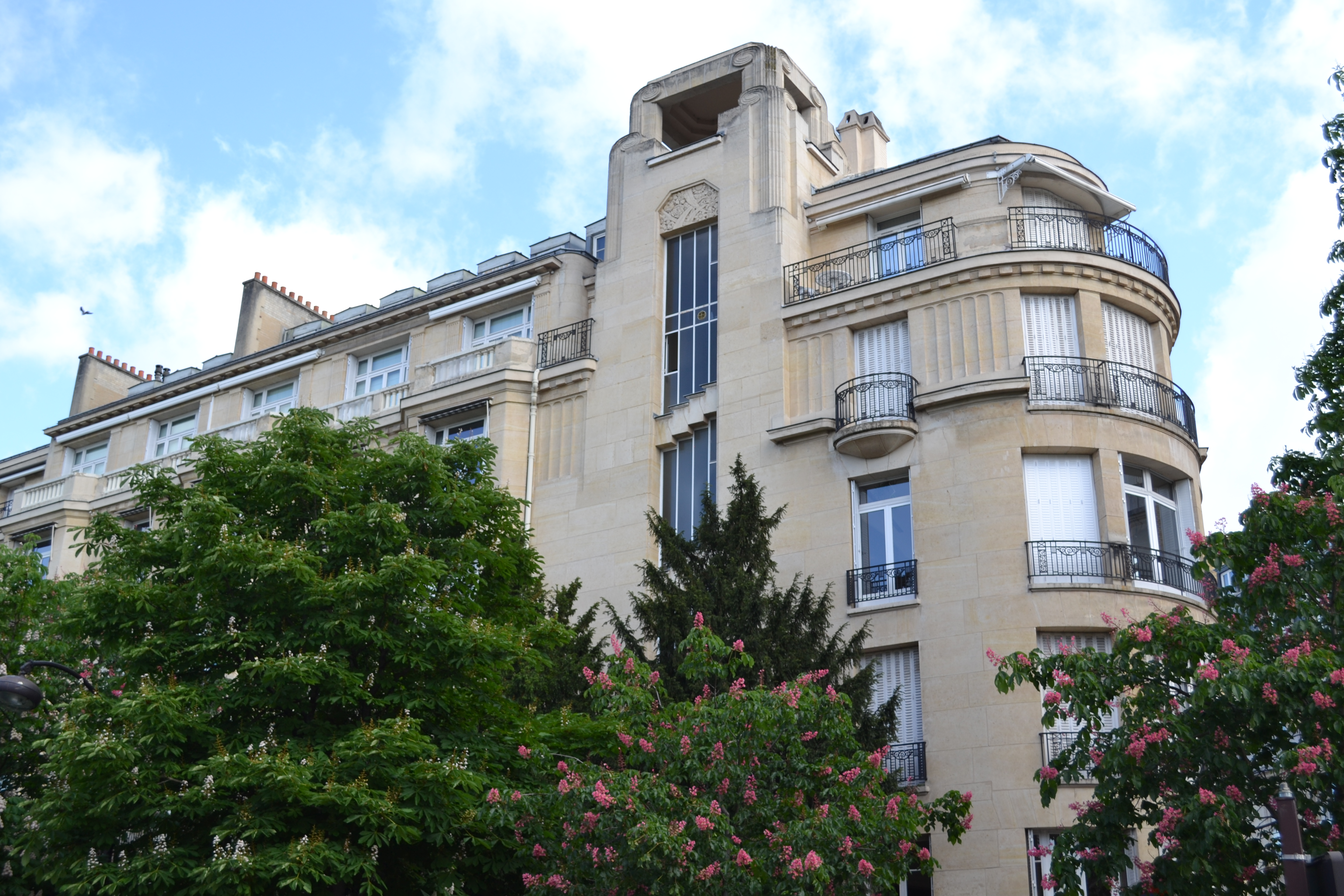 Immeuble situé à l'angle de la rue d'Andigné et de la chaussée de la Muette, Paris, 16e arrondissement.